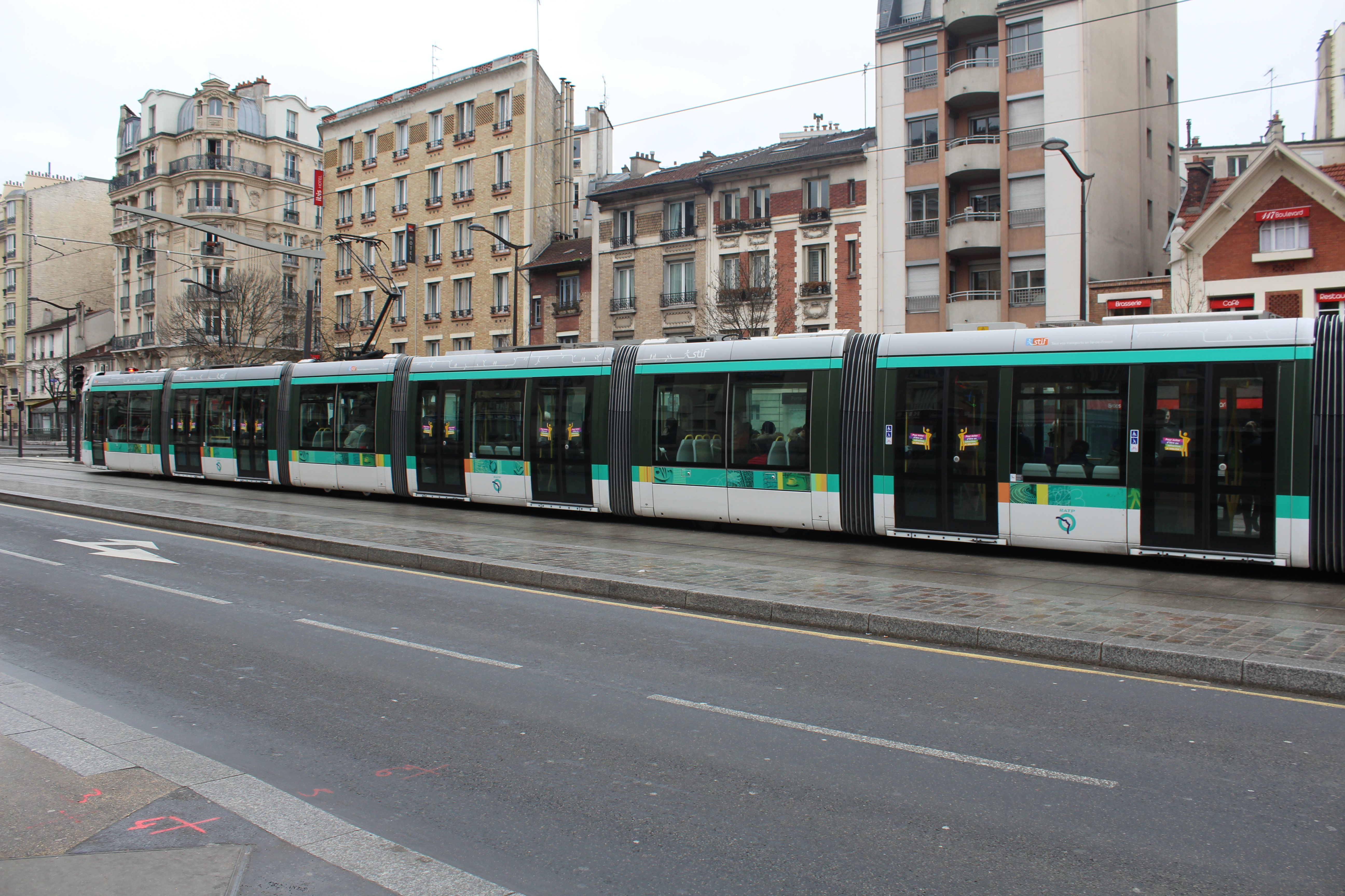 Tramway à la station Porte Dorée sur la ligne 3a du tramway d'Île-de-France.